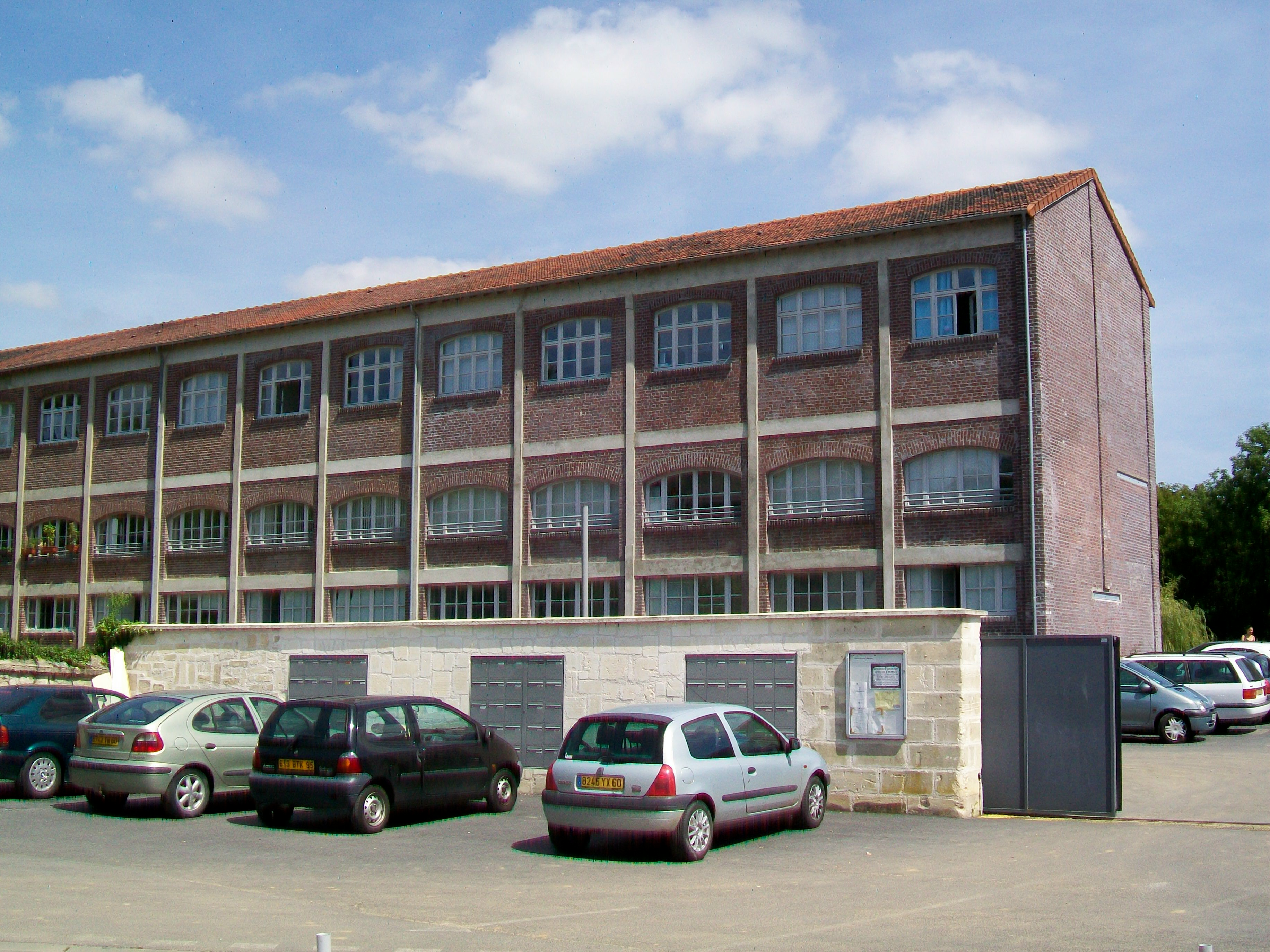 Ancienne usine dite Parvilliée ; ateliers construits après 1920, rue du Pont. L'ensemble de l'usine a été convertie en logements.